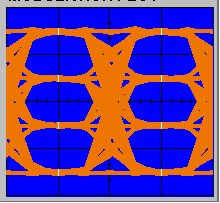 Eye Diagram for 4 level PAM digital signal